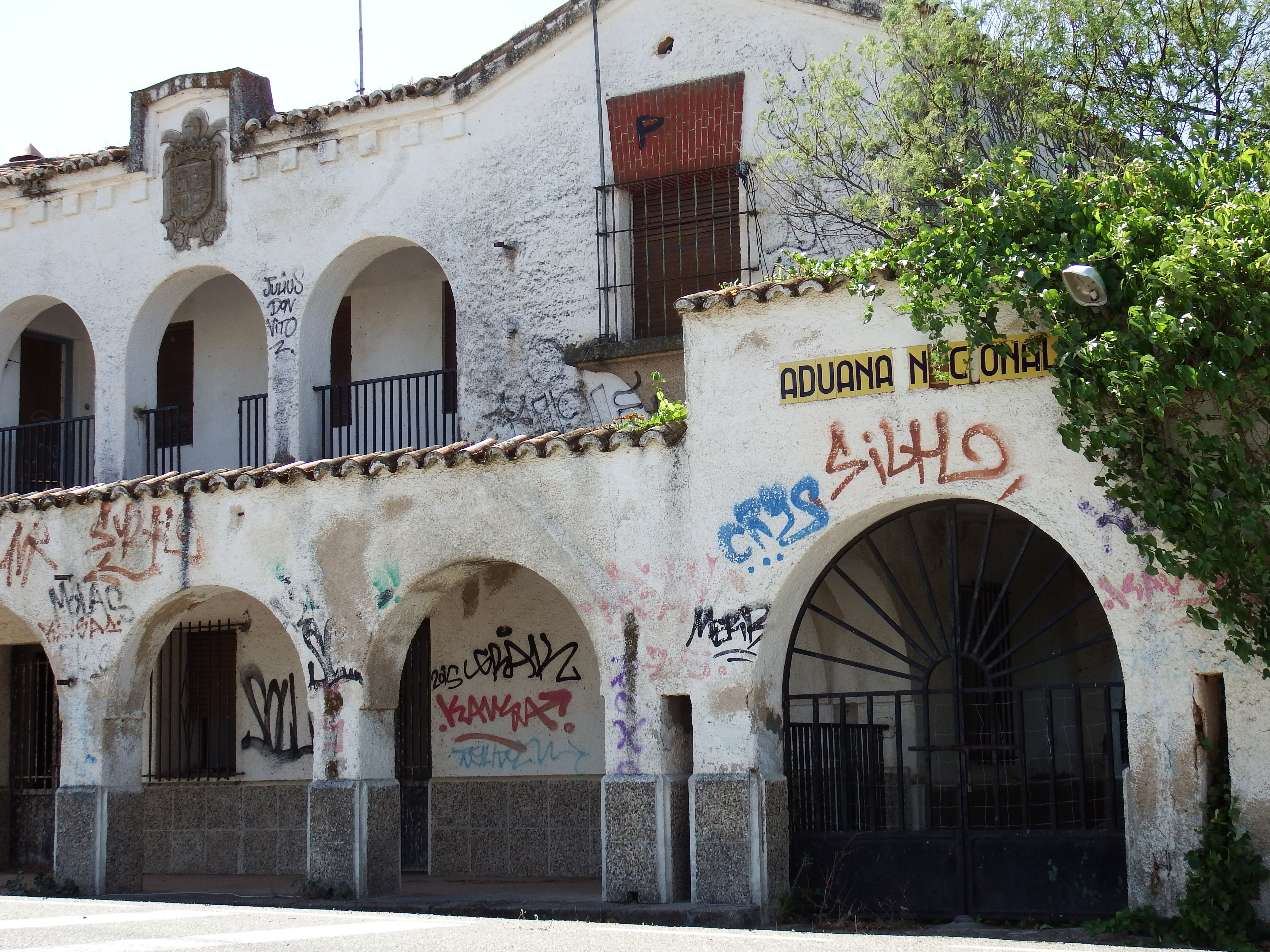 Piedras Albas, Cáceres